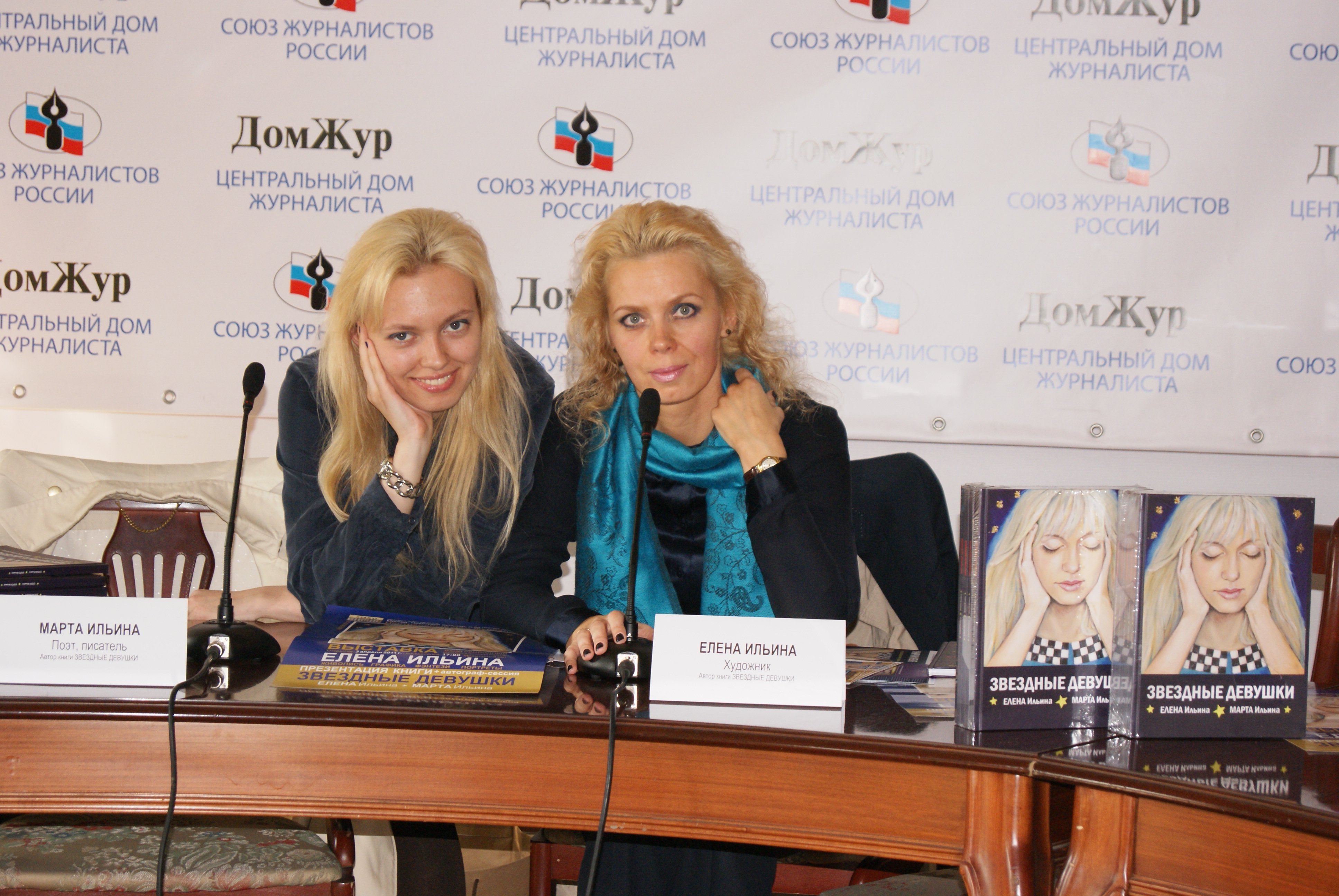 04/2011 – персональная выставка и презентация книги «ЗВЕЗДНЫЕ ДЕВУШКИ», Центральный Дом Журналиста, Москва, Россия